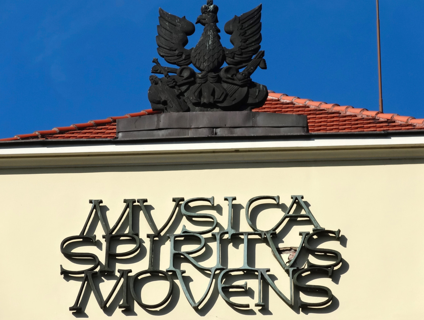 Zespół Urzędu Powiatowego, zbud. 1904-1906, ob. budynek główny Akademii Muzycznej w Bydgoszczy przy ul. Słowackiego